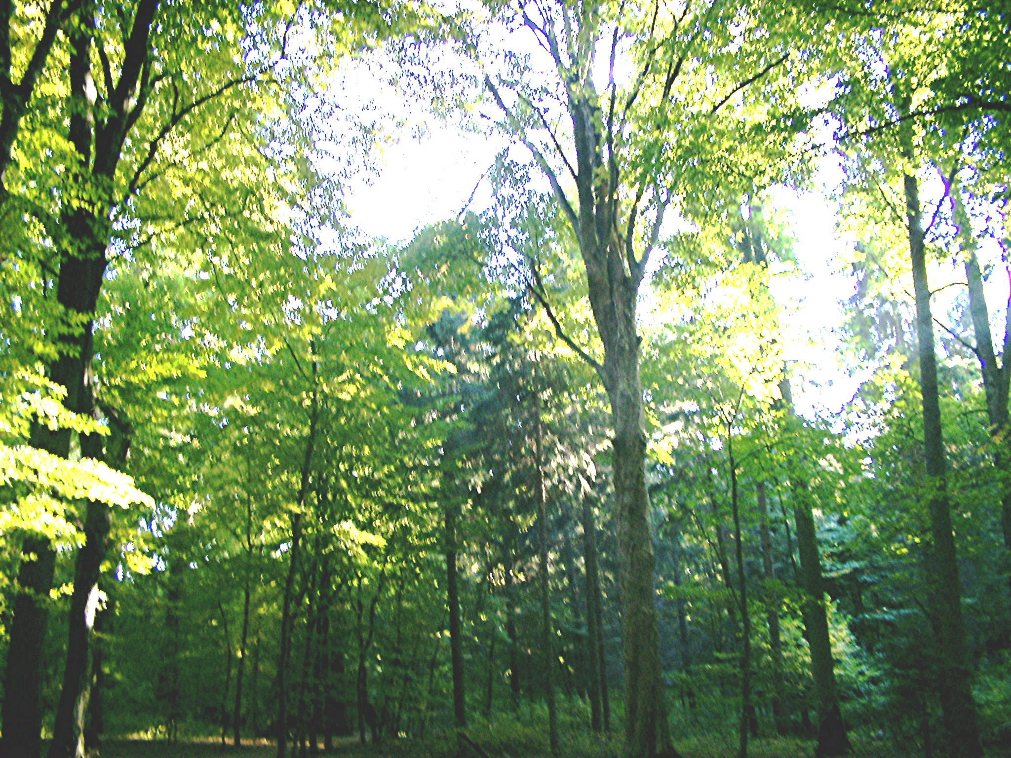 Das Niendorfer Gehege in Hamburg-Niendorf.